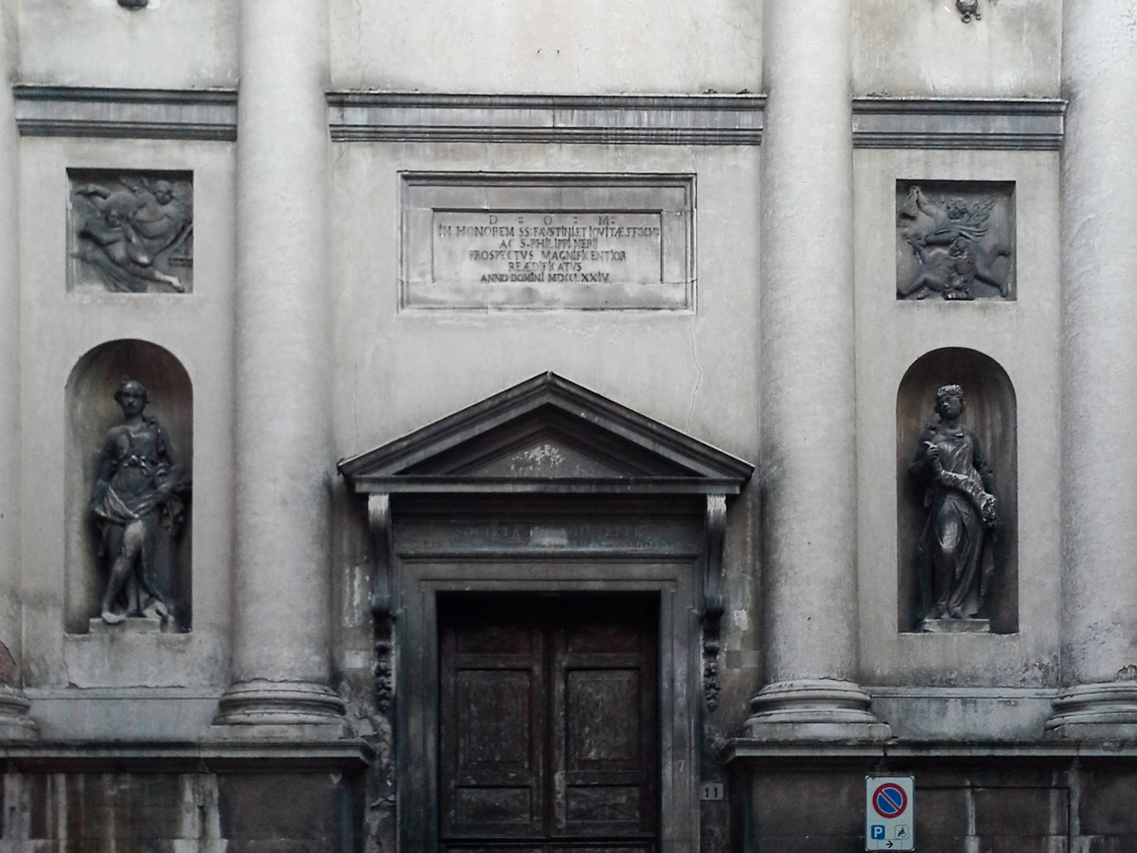 Chiesa di San Faustino a Vicenza - Parte della facciata, di Ottavio Bertotti Scamozzi